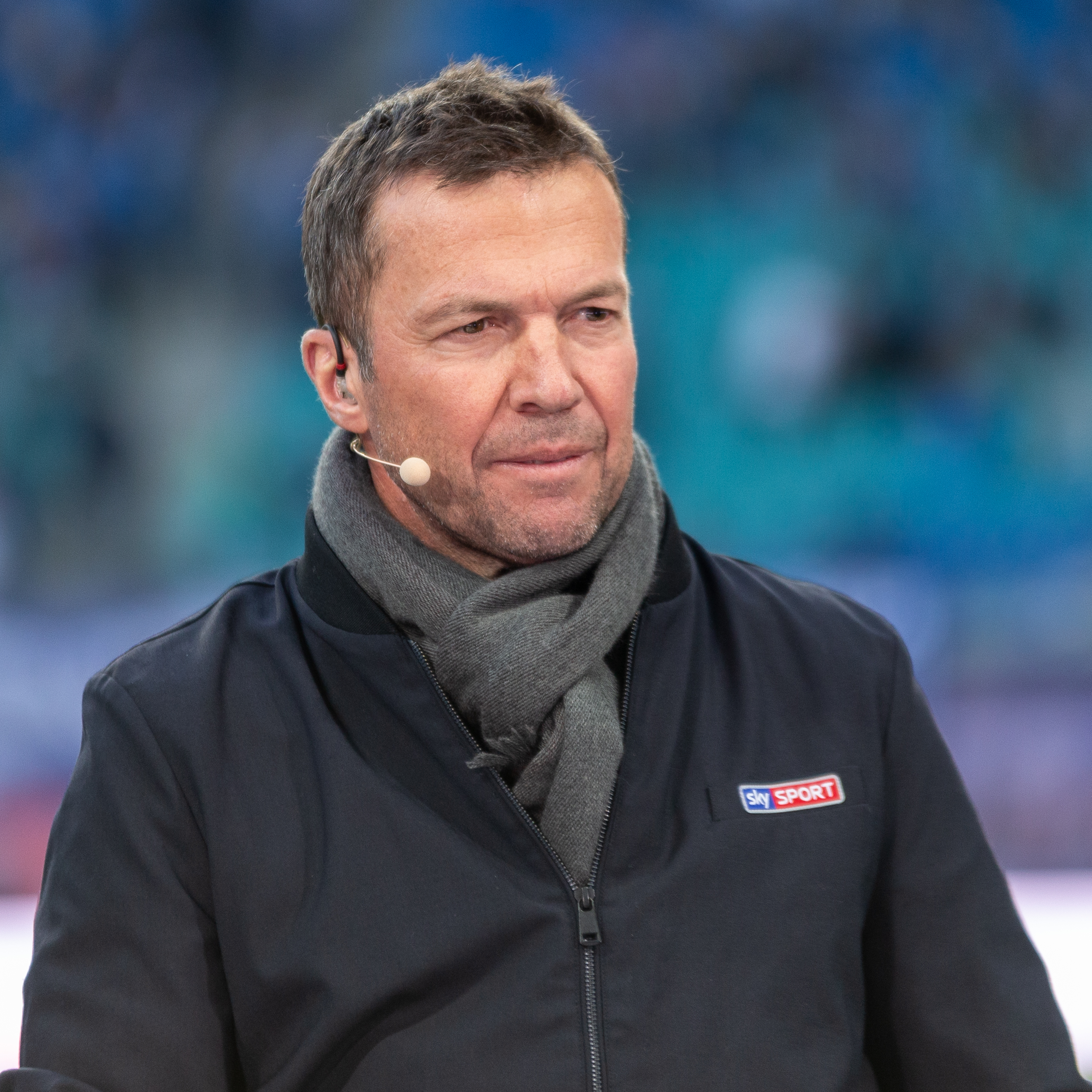 Fußball, Männer, 1. Bundesliga, RB Leipzig - Hertha BSC; Lothar Matthäus; Porträt, Einzelbild